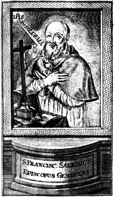 Книга Des heiligen Franz von Sales christliche Lebensregeln. Augsburg, 1789